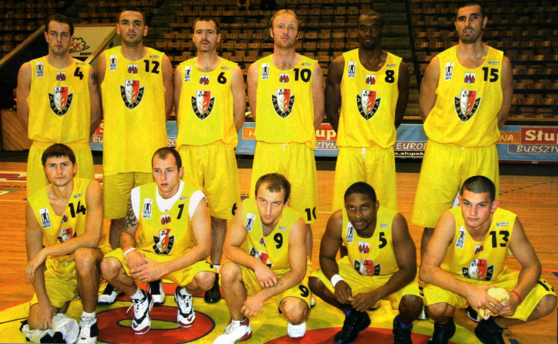 Koszykarska drużyna Astoria Bydgoszcz przed sezonem 2005/2006. sam pyknelem foto